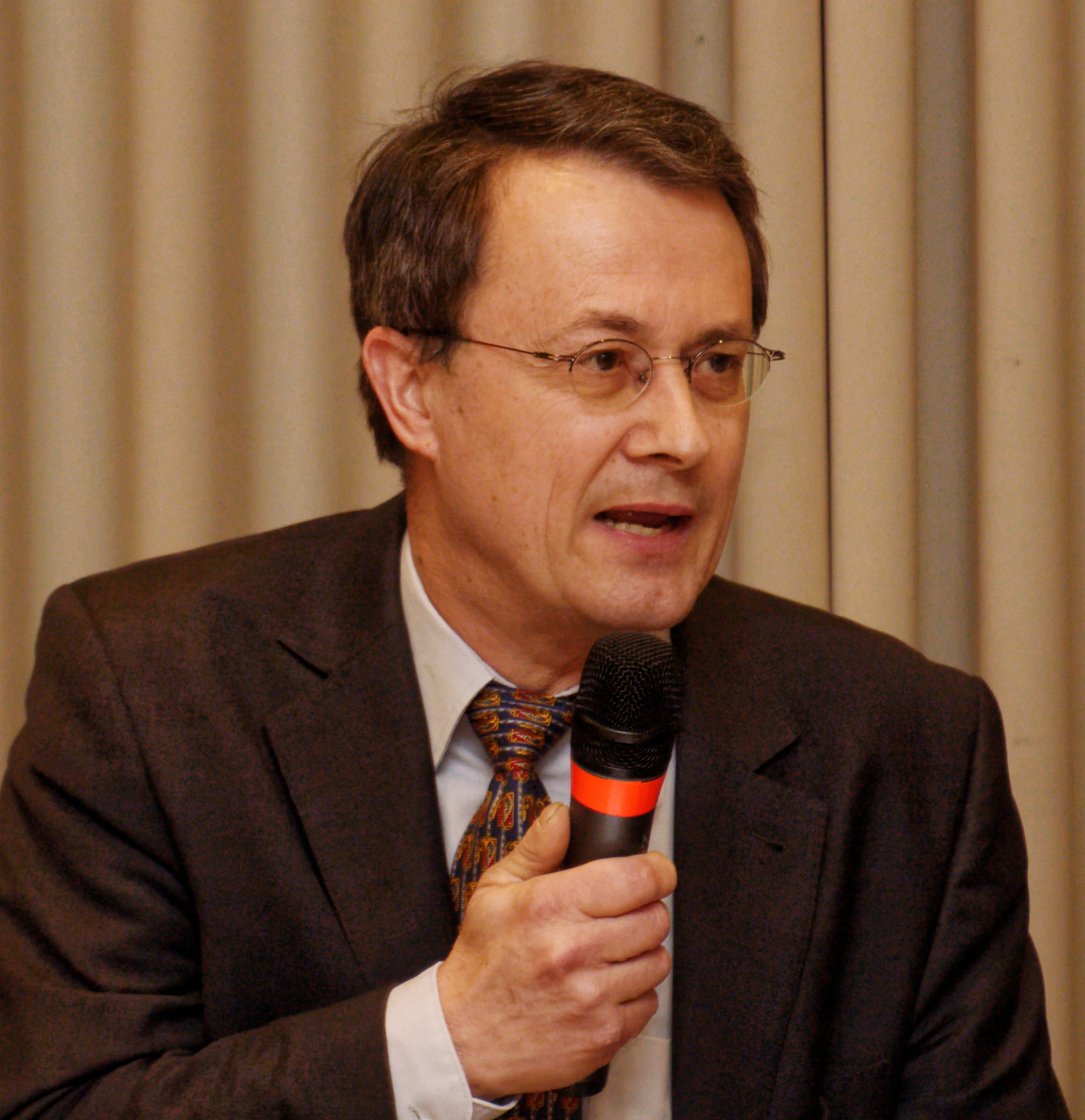 Wolfgang Stock; Moderator einer Veranstaltung der Adalbert-Stiftung Krefeld in der Ungarischen Botschaft Berlin